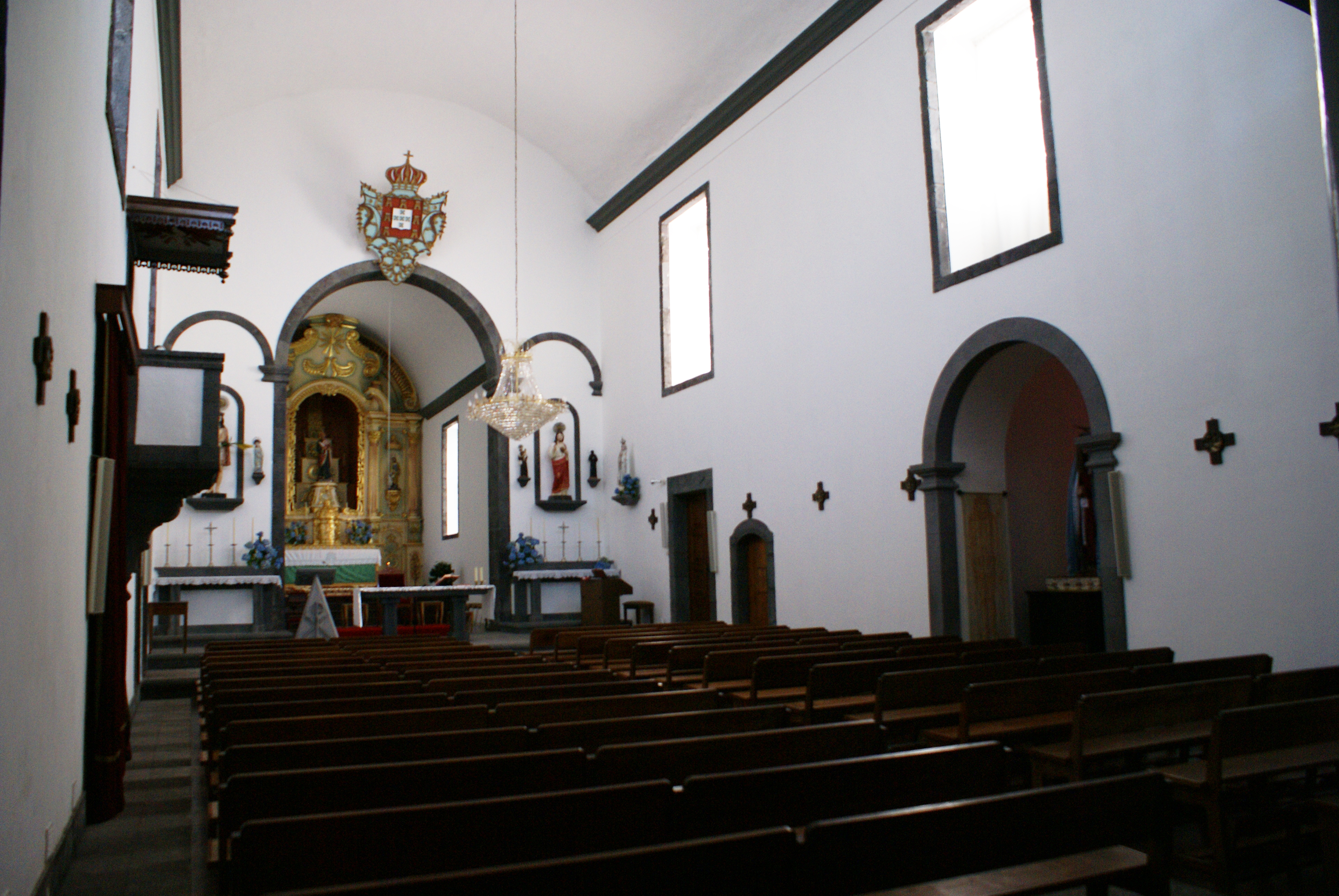 Central nave of the Church of São Mateus, Urzelina, Velas, São Jorge (Azores), Portugal